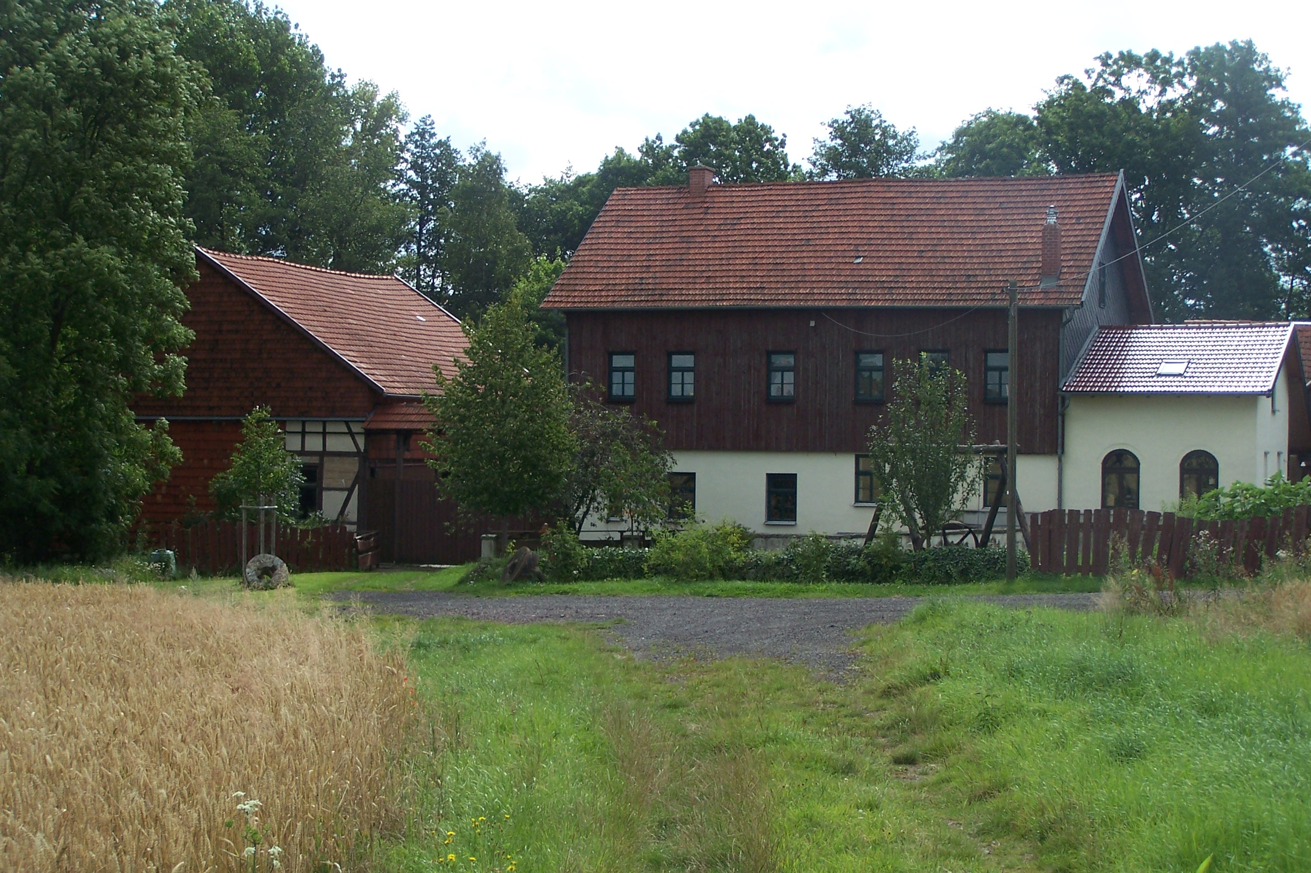 Laucha (Thüringen)